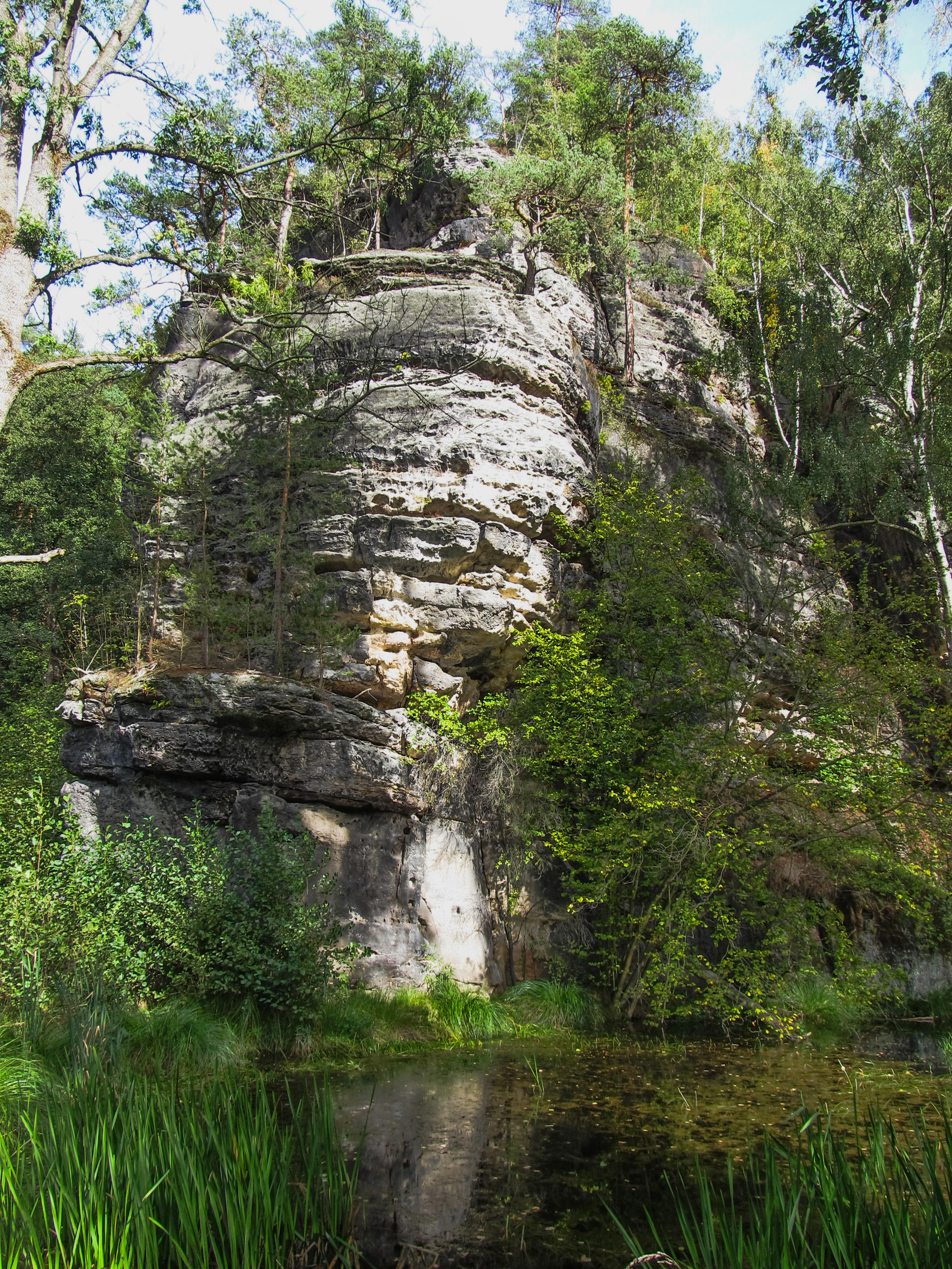 Skály u jezírka pod vyhlídkou